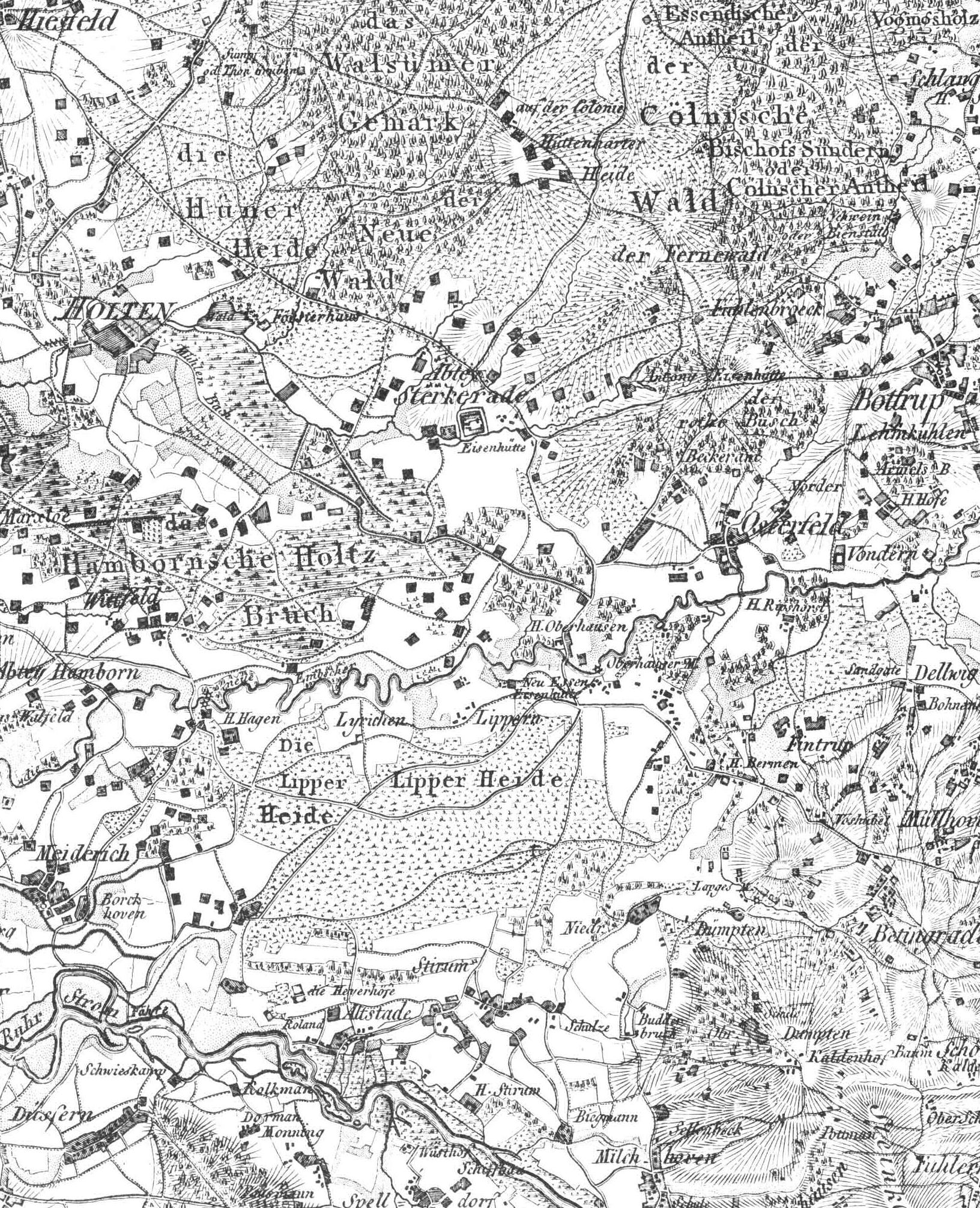 Große Karte von Westphalen, Blatt Wesel... (heutiges Ruhrgebiet) - Ausschnitt Raum Oberhausen